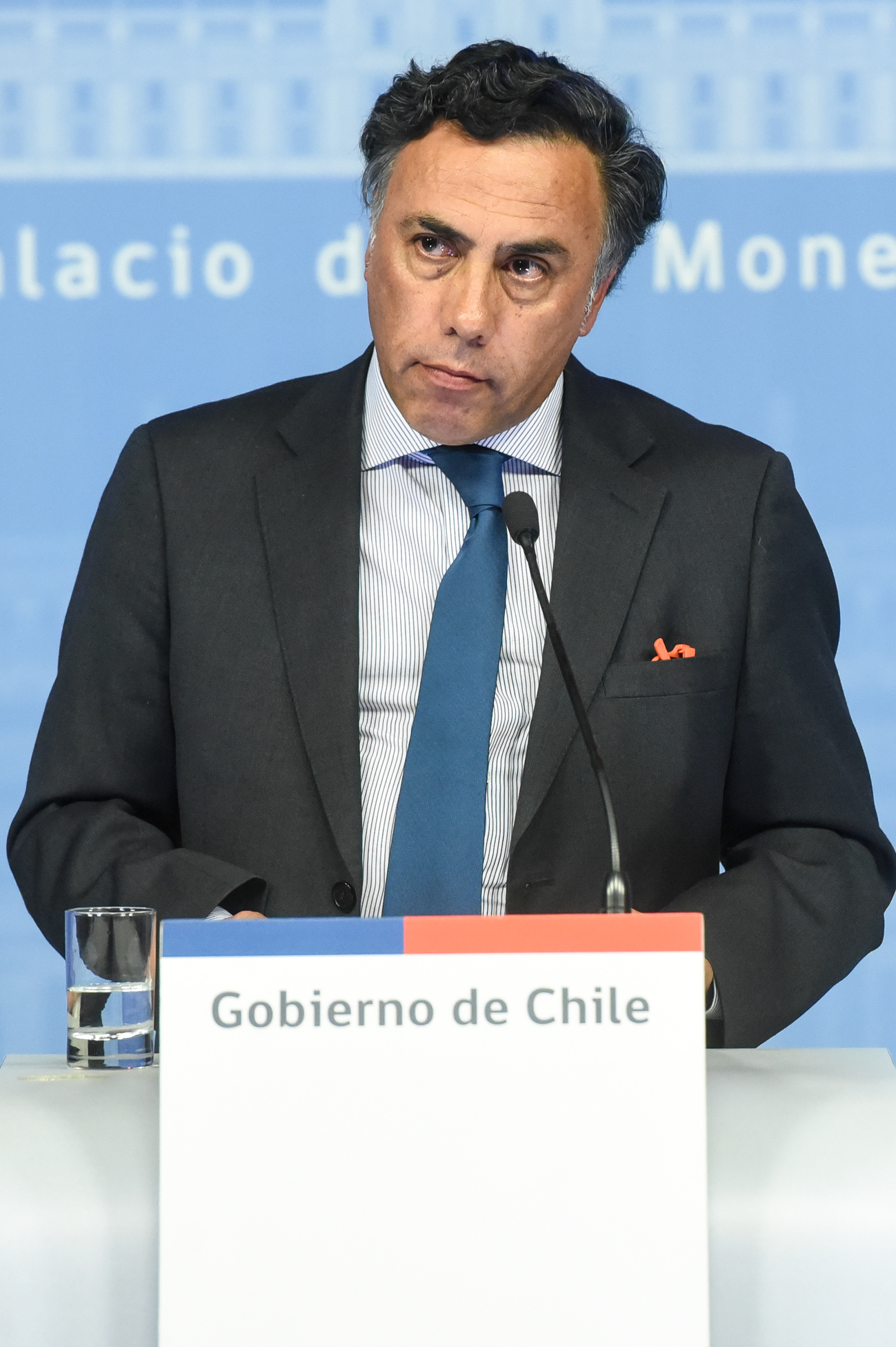 Vocería del Ministro (S) Omar Jara